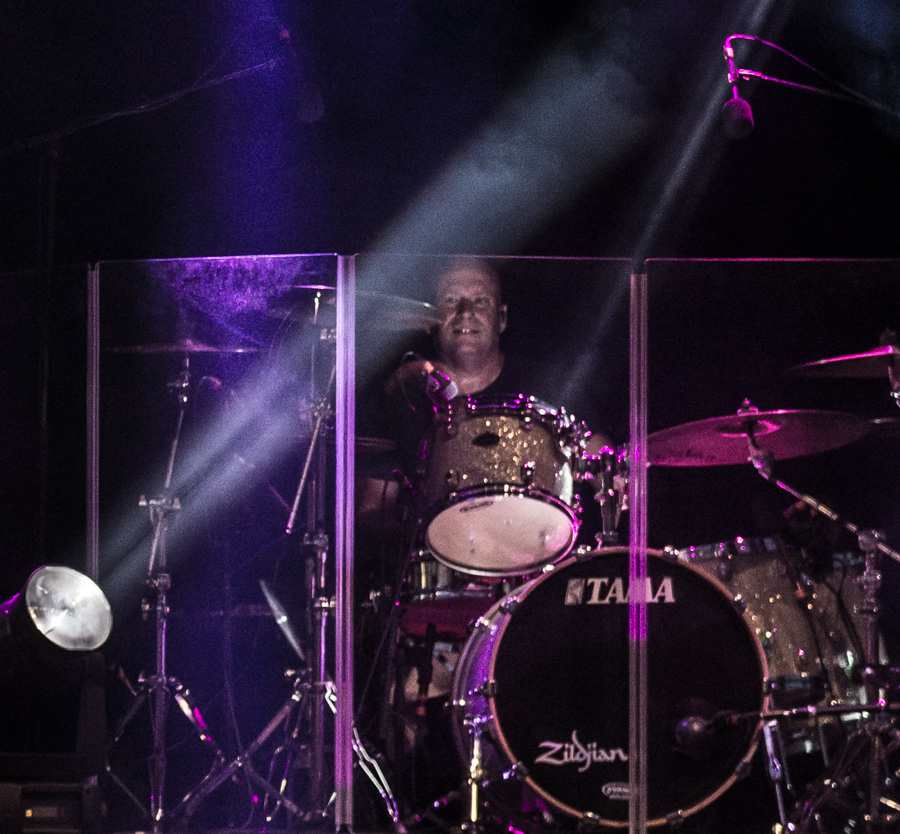 Sven-Ingvars uppträder inför en fulltalig publik på Gröna Lund i Stockholm den 12 augusti 2016. Klas Anderhell på trummor.